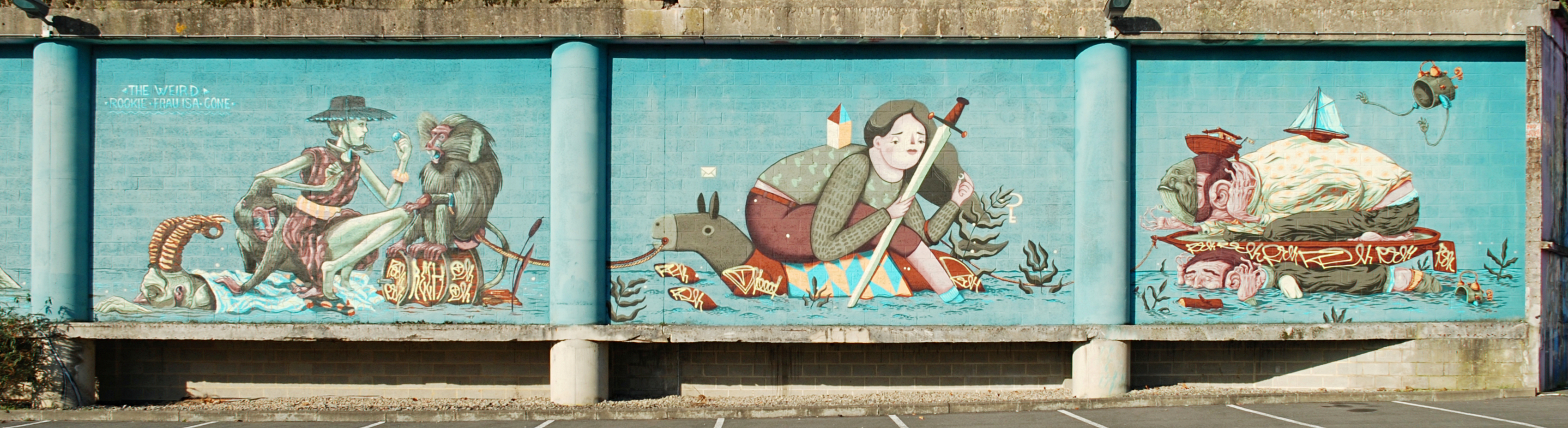 Belgique - Louvain-la-Neuve - Fresque Kosmopolite Art Tour 2015 - Parking du Sablon